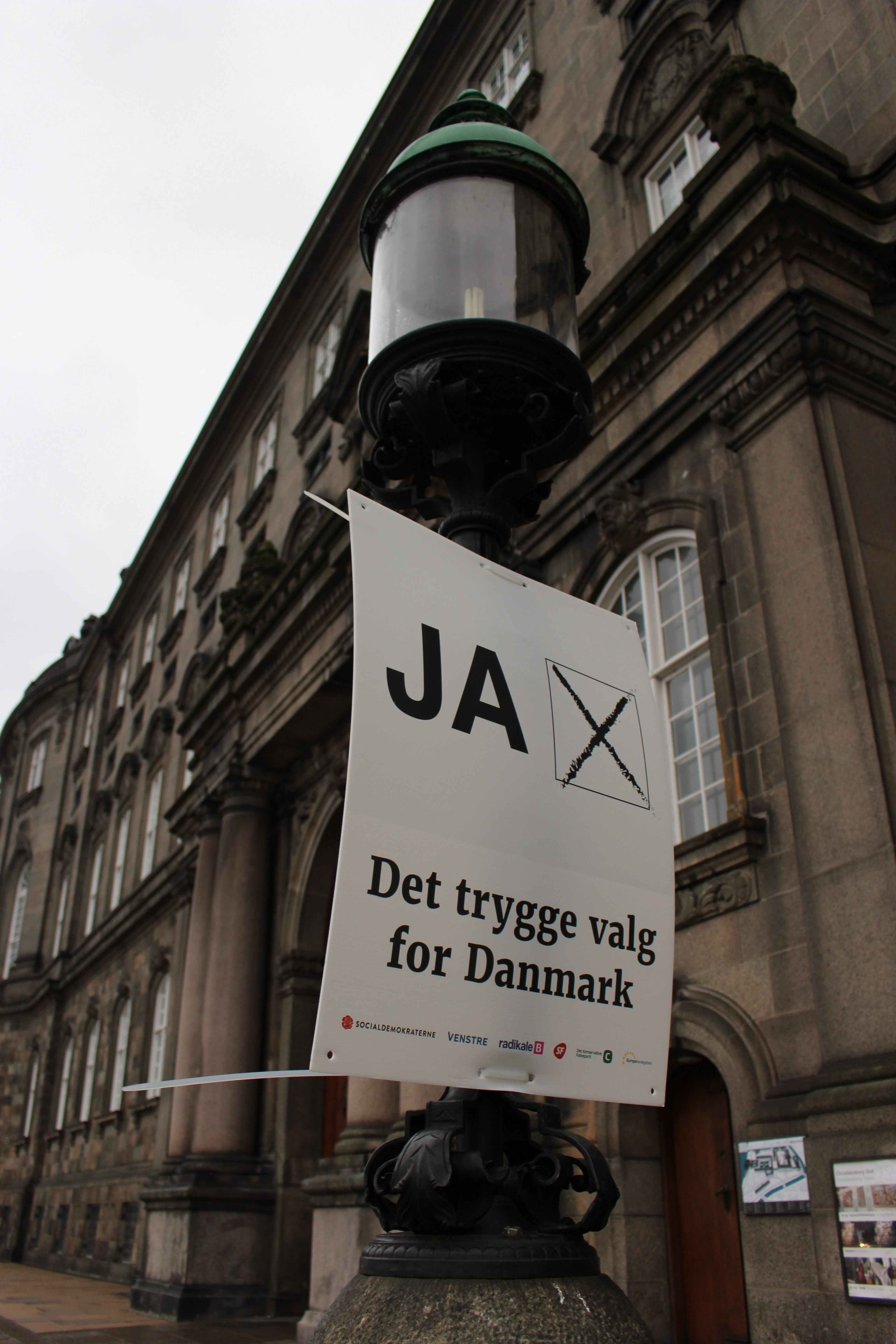 Valgplakat fra Socialdemokraterne, Venstre, Radikale, SF, Det Konservative Folkeparti og Europabevægelsen med påskriften "JA Det trygge valg for Danmark". Foran Christiansborg efter Folkeafstemningen om Retsforbeholdet.